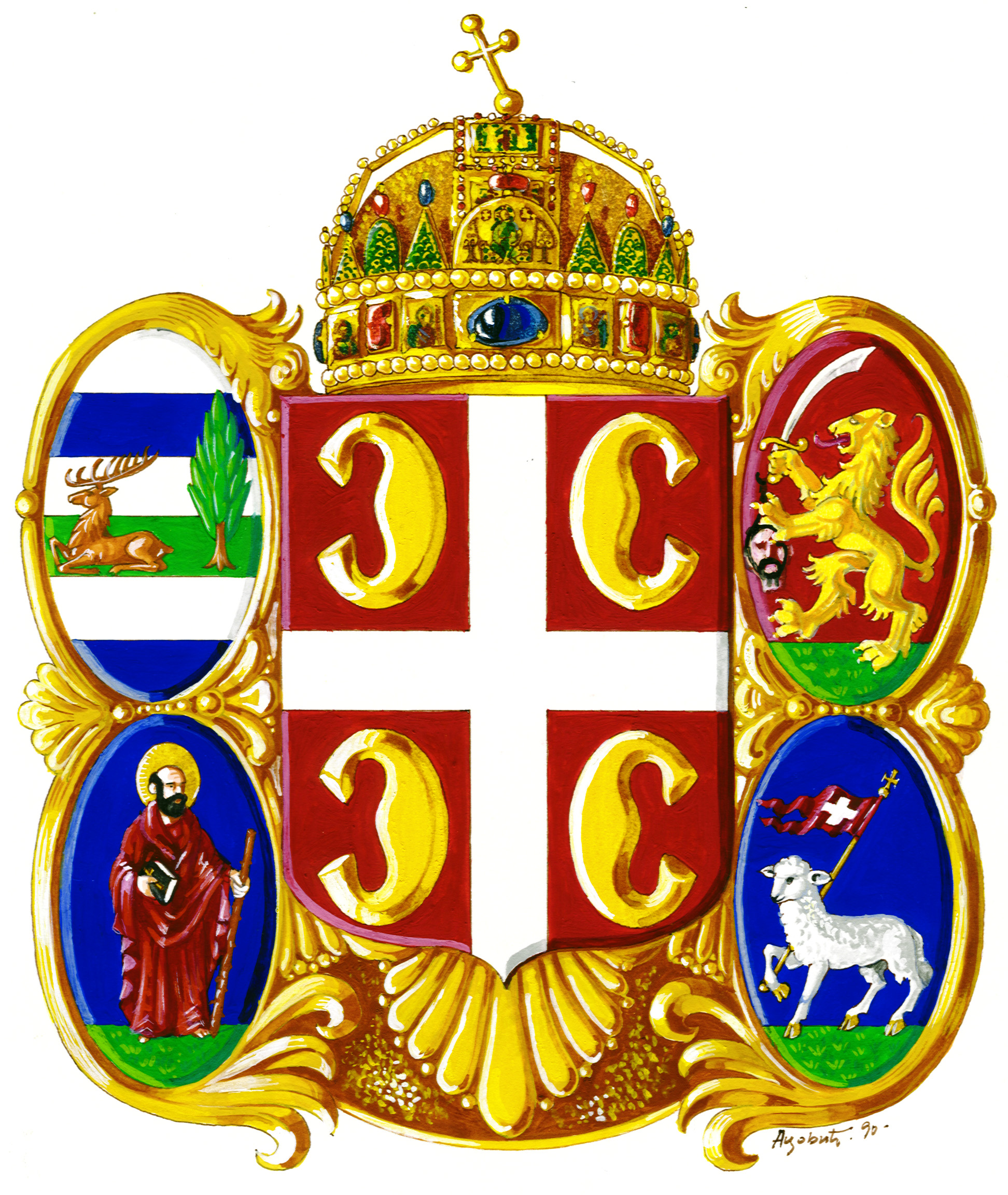 Историјски грб Српске Војводине из 1848. године (са заставе Земунске Народне Гарде).